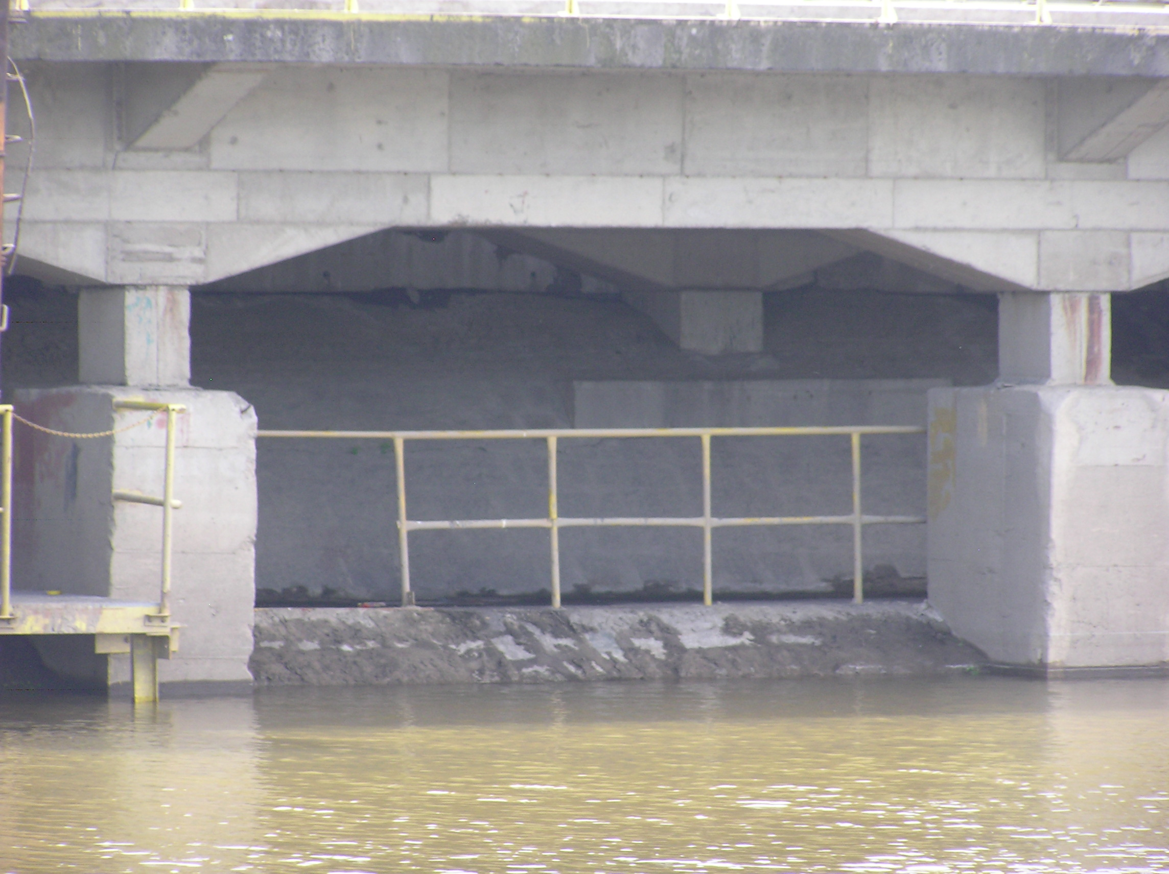 Wrocław, Kleczków, Odra - Kanał Miejski/Stara Odra, Przeładownia Elektrociepłowni Wrocław